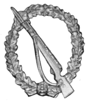 Infanterie-Sturmabzeichen in der 57er Version